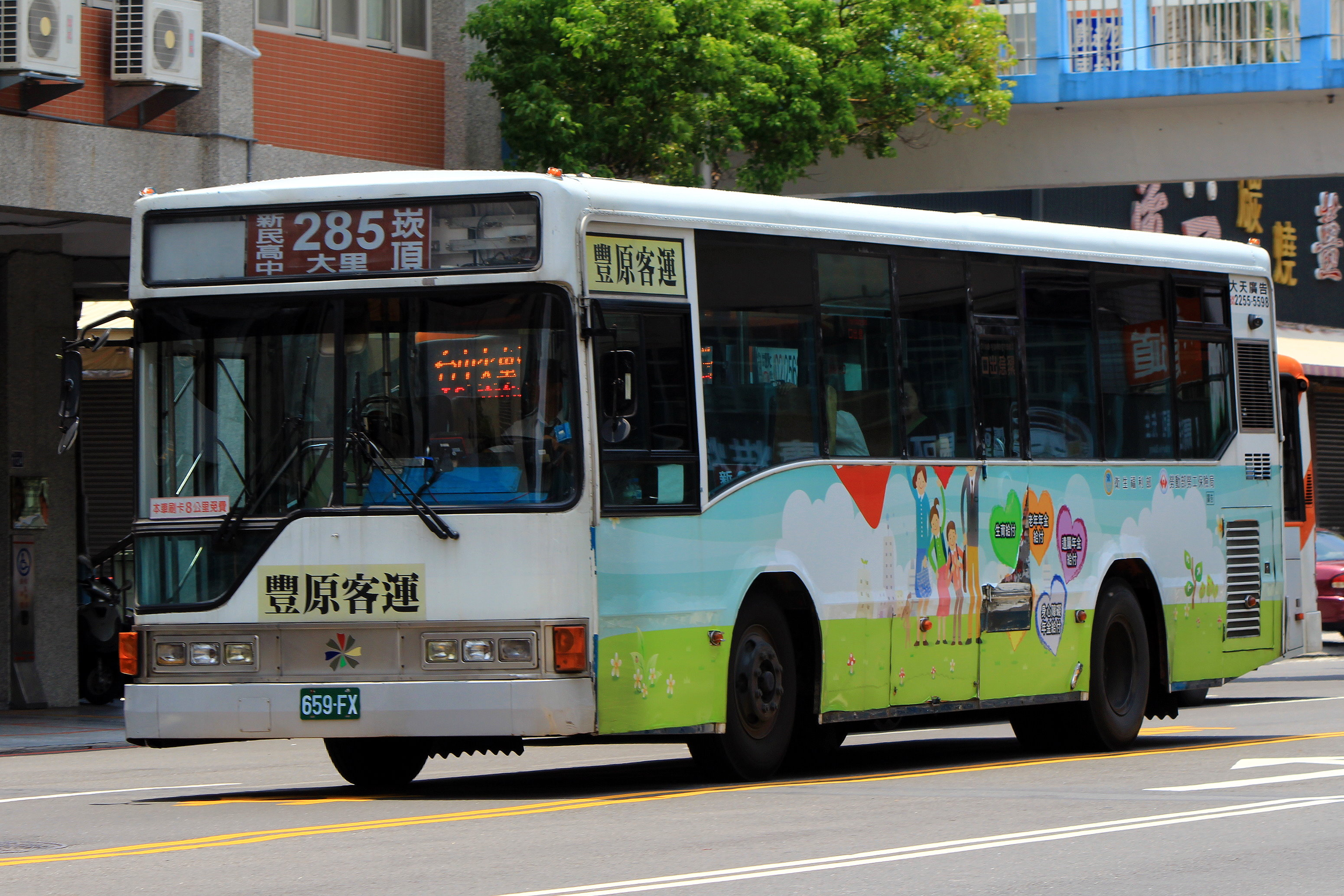 2005(2012) Hino ERK2JML (豐榮)